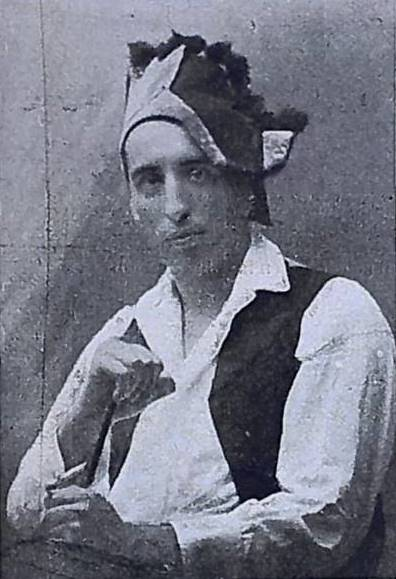 Xavier Soto, fotografía en Vida Gallega 1919